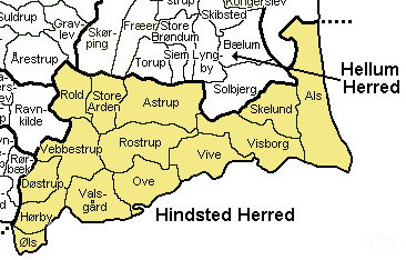 Hindsted Herred, Aalborg Amt, Denmark Source: Map by Svend-Erik Christiansen